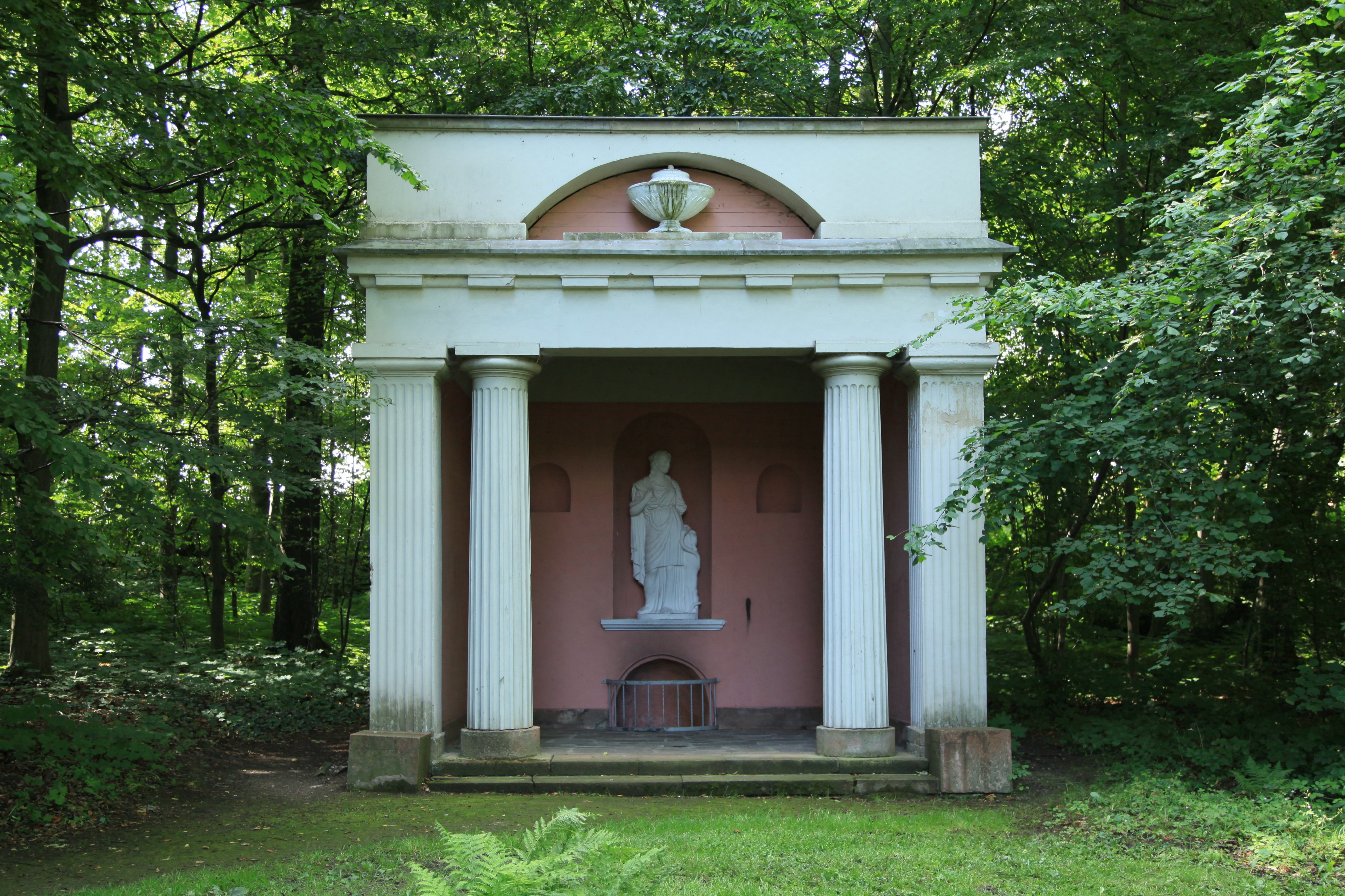 Tempel der Hygieia im Schlosspark in Machern